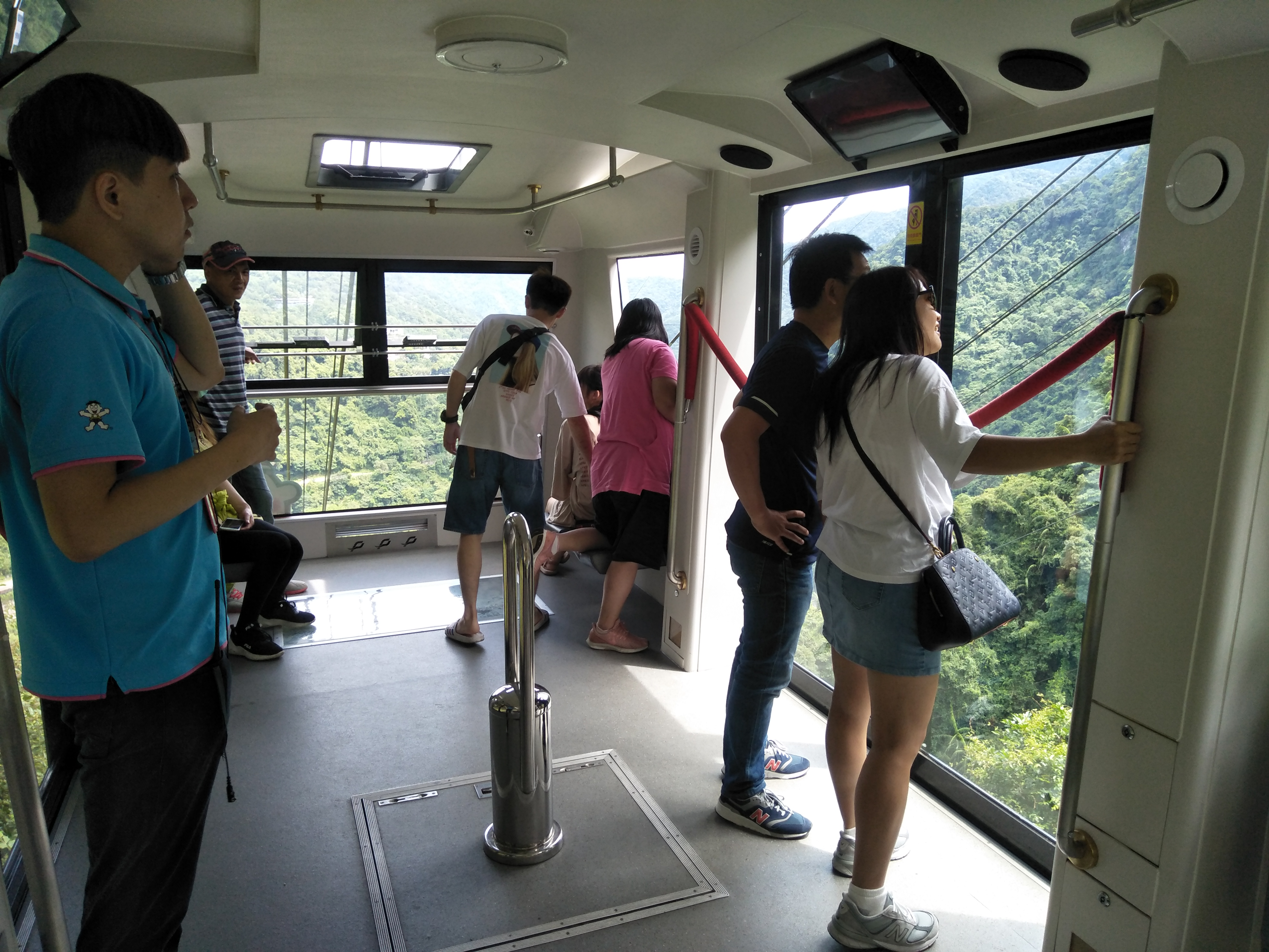 拍攝時間:2020年7月2日，拍攝地點:烏來區雲仙樂園，拍攝工具:智慧型手機